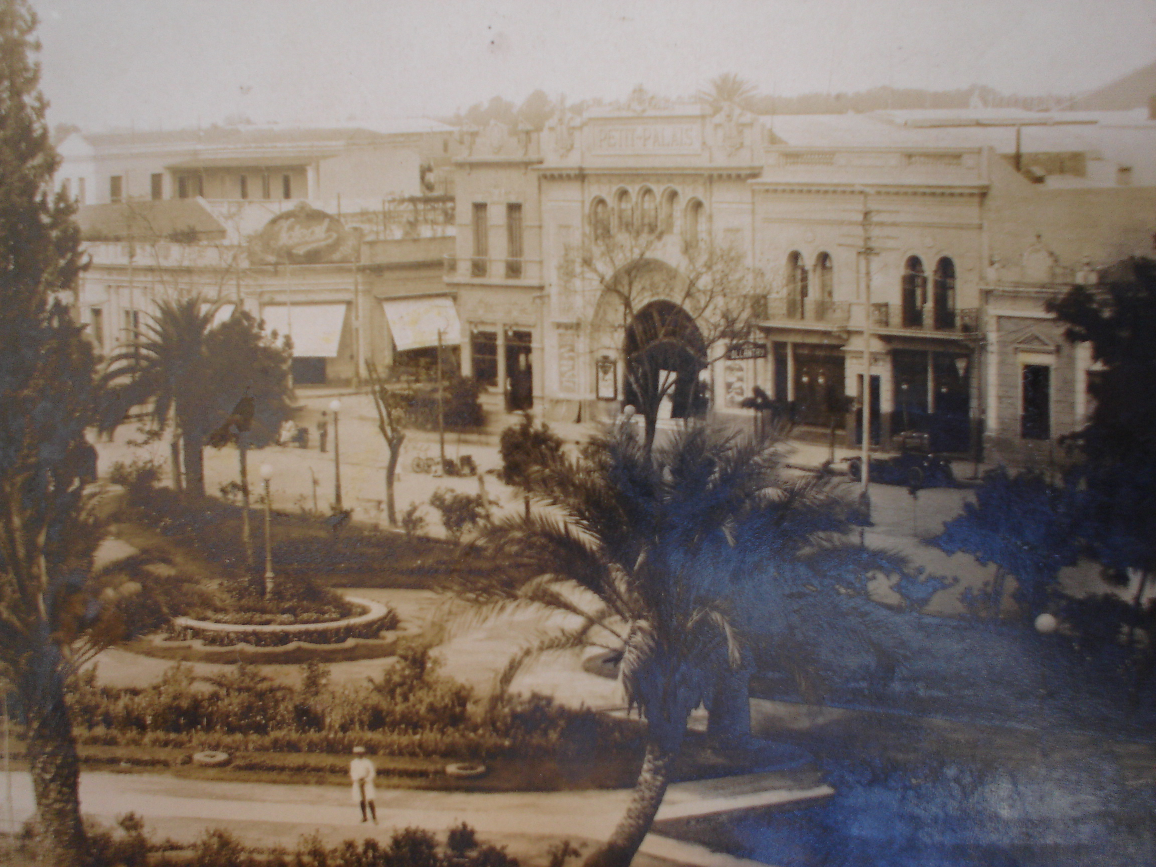 Inaugurado en enero de 1917 la gran sala del Petit Palais, fue centro para funciones cinematográficas, teatrales y de café concert que pertenecieron al empresario francés Pablo Mazure, ponía a Santiago en el camino de los grandes espectáculos de ese orden.